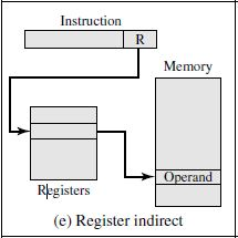 Adresimi indirekt me regjistër